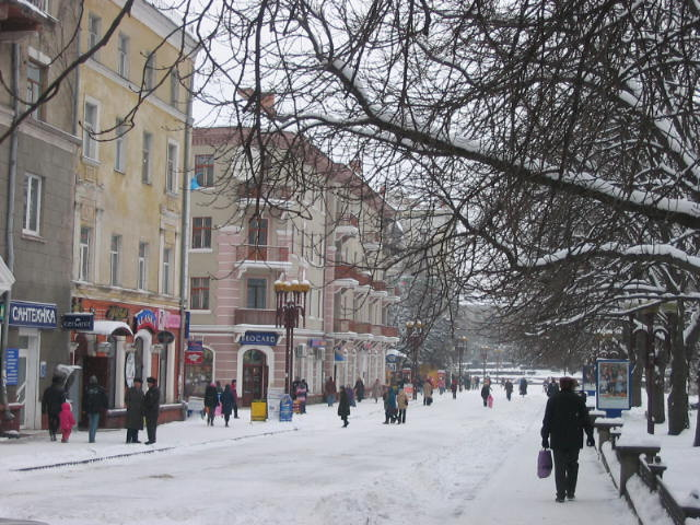 Winter in Ternopil, Ukraine